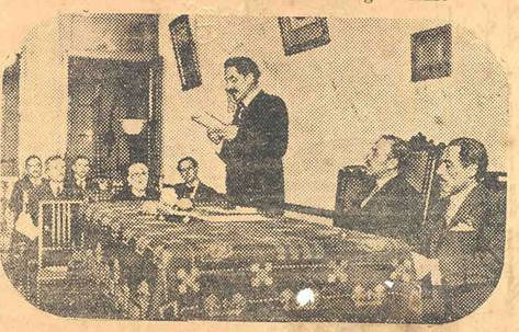 Conferencia del Prof. Juan Estève Dulin, en la Sociedad Vegerariana de Brasil, 1921